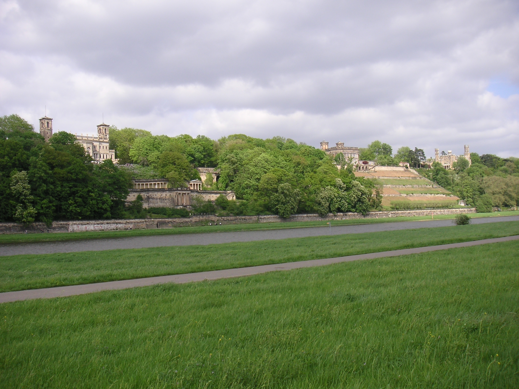 Dresden, Drei Elbschlösser (Lingnerschloss, Schloss Albrechtsberg, Schloss Eckberg)